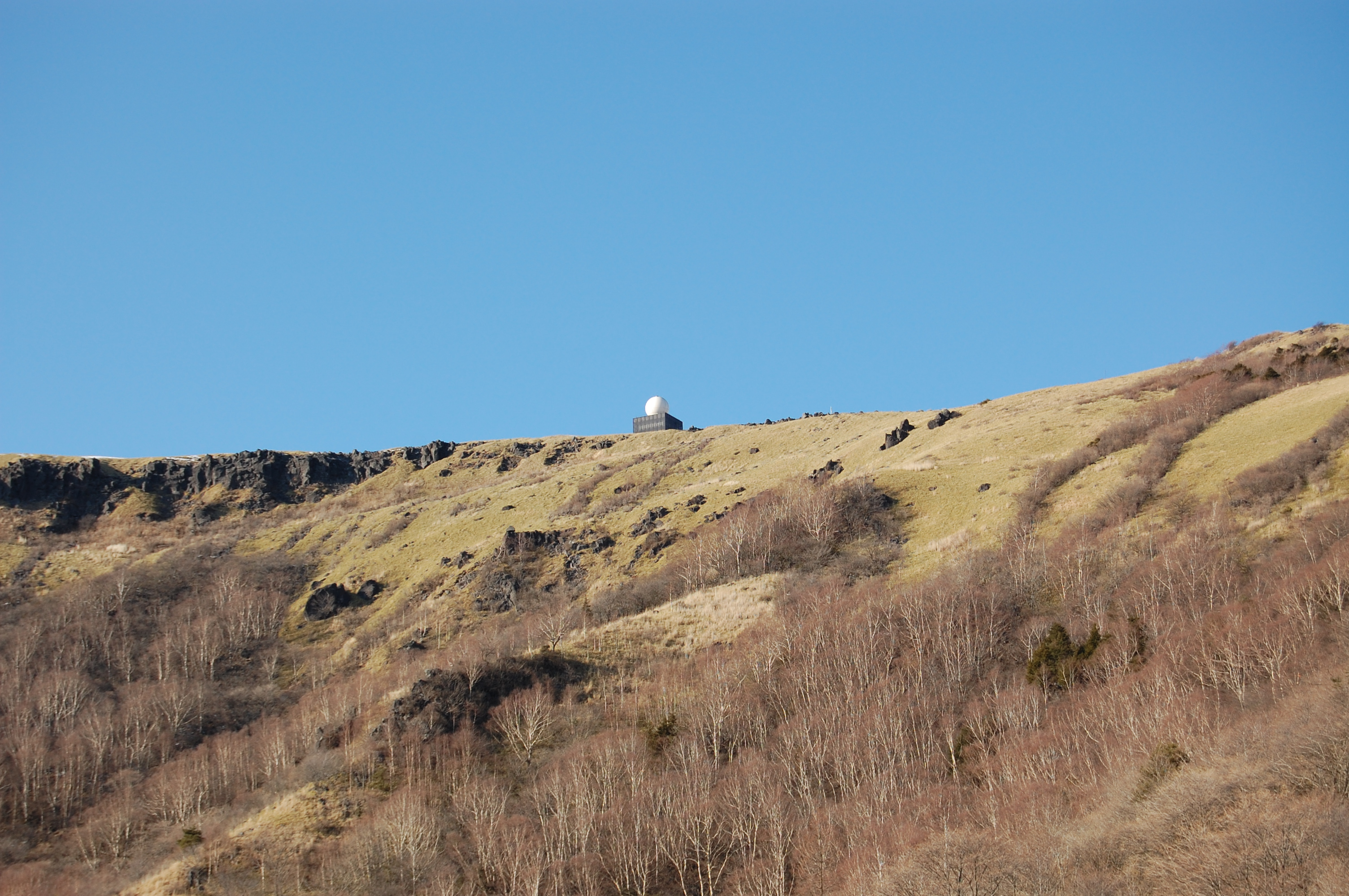 ビーナスラインより車山レーダーを望む